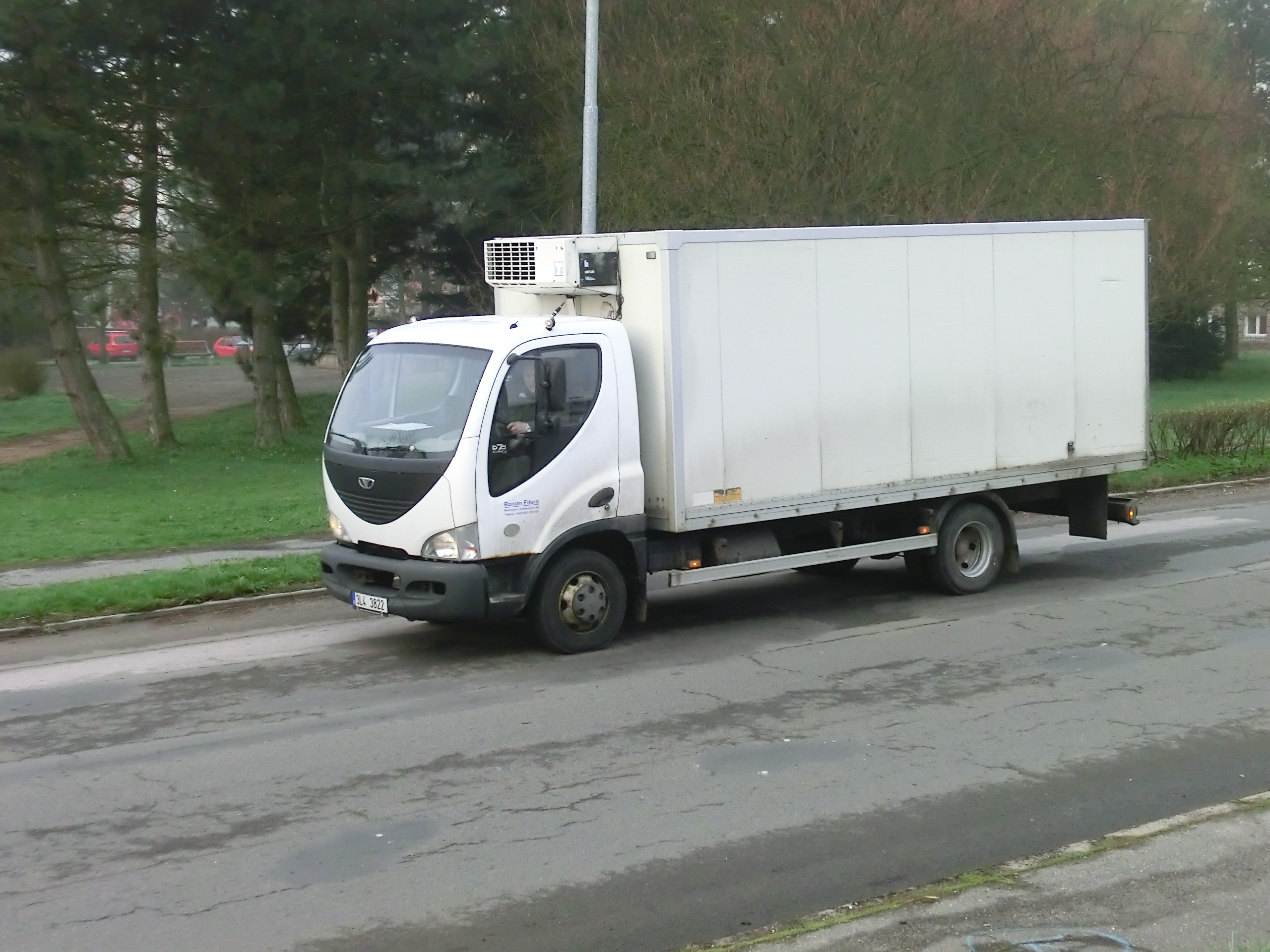 Avia D75 se skříňovou chladírenskou nástavbou.